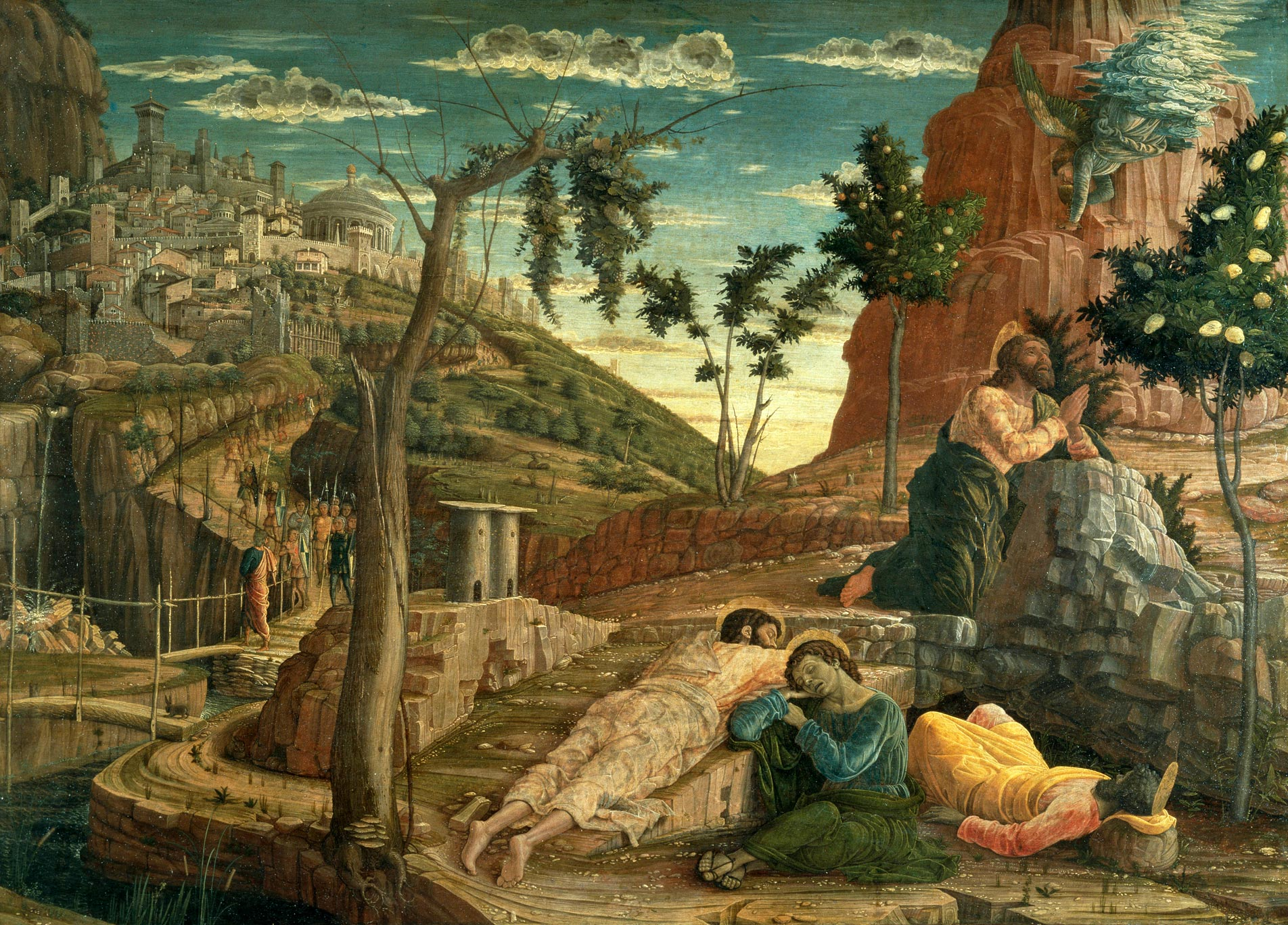 Triptychon, linke Predellatafel: Christus am Ölberg